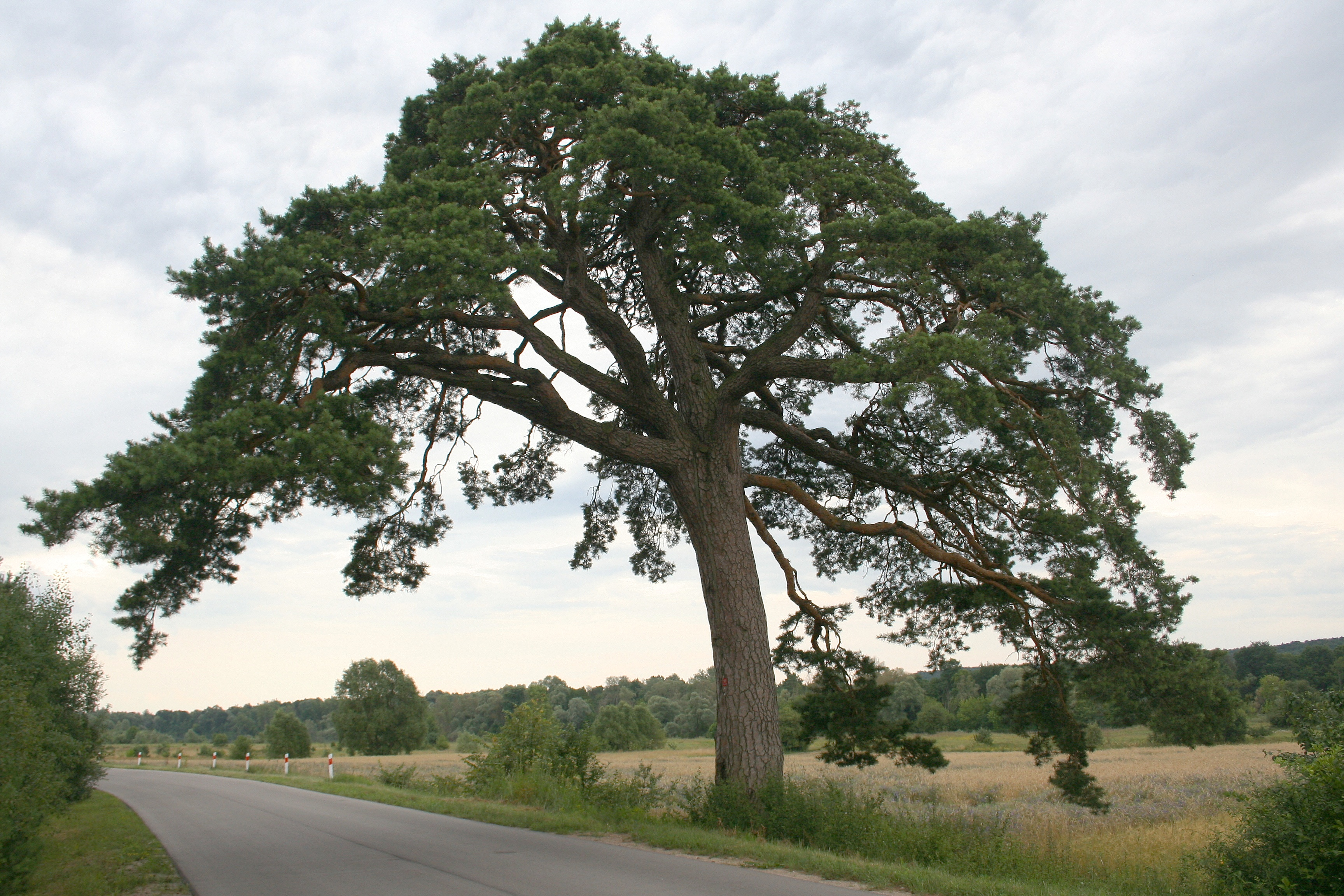 pomnikowa sosna przy drodze do miejscowości Mielnik, woj. podlaskie